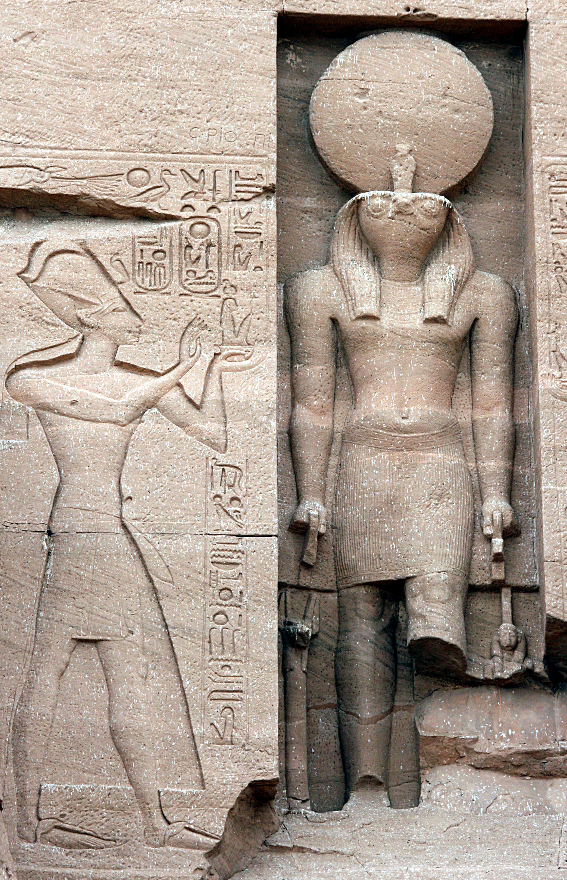 Abu_Simbel,_Großer_Tempel